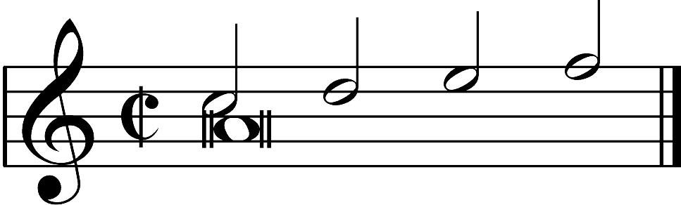 Notenbeispiel für kontrapunktische